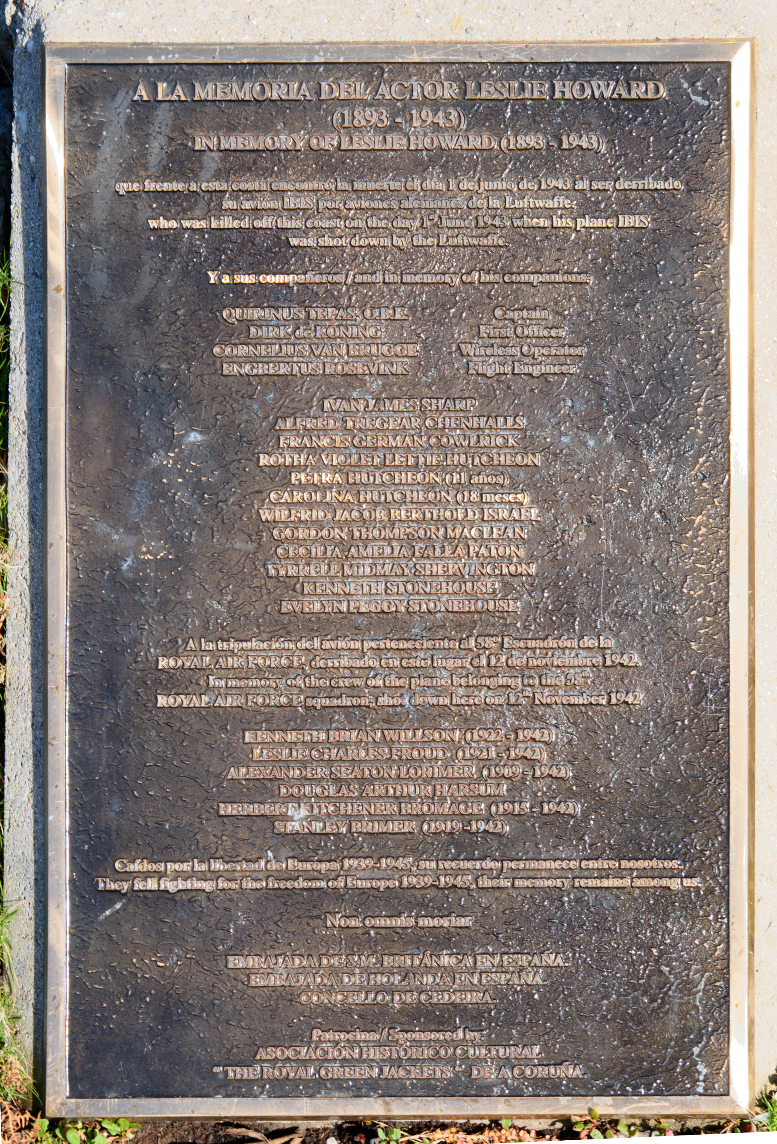 Gedenktafel am Cruceiro de Teixido, Galicien, für britische Flugzeugbesatzungen und Passagiere, die im Zweiten Weltkrieg durch deutsche Luftwaffe abgeschossen wurden.